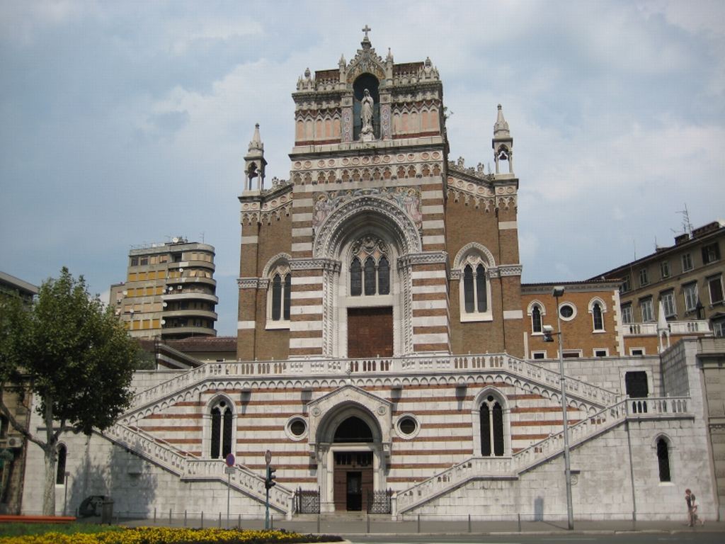 Crkva Gospe Lurdske, Rijeka, Croatia